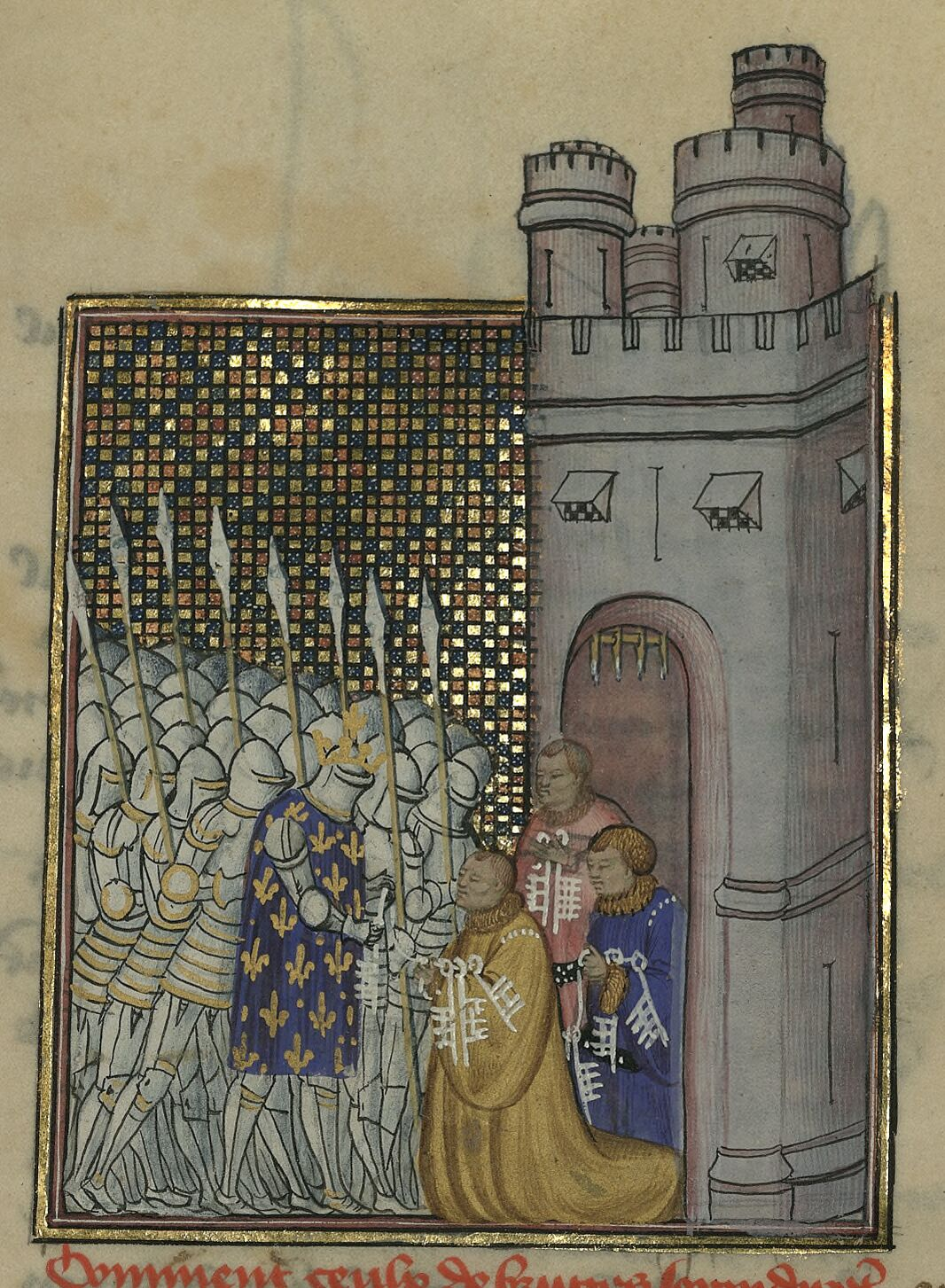 Karel VI přijímá kapitulaci měšťanů